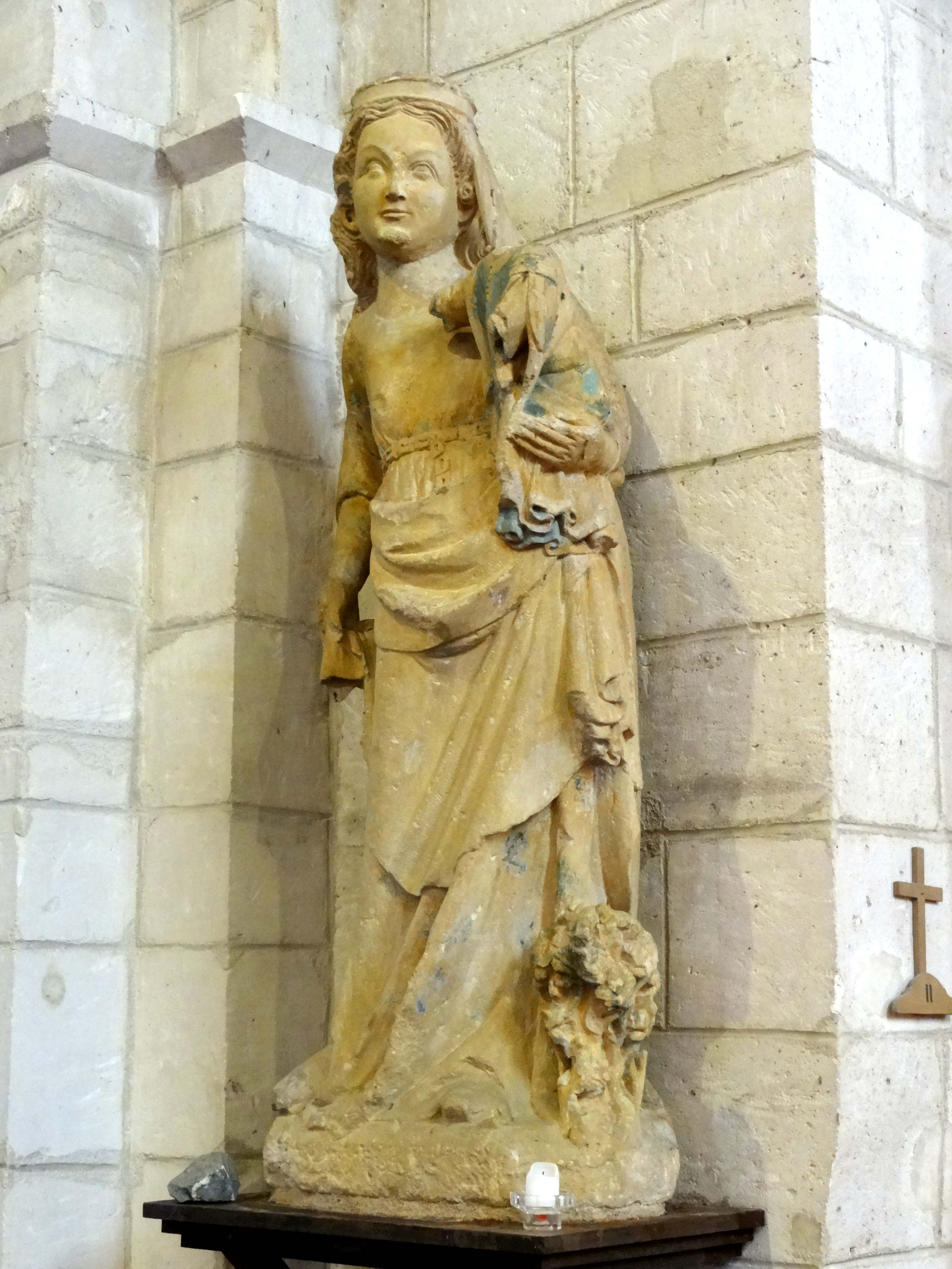 Vierge à l'Enfant au buisson ardent du XIVe siècle provenant de l'église de Noël-Saint-Martin.